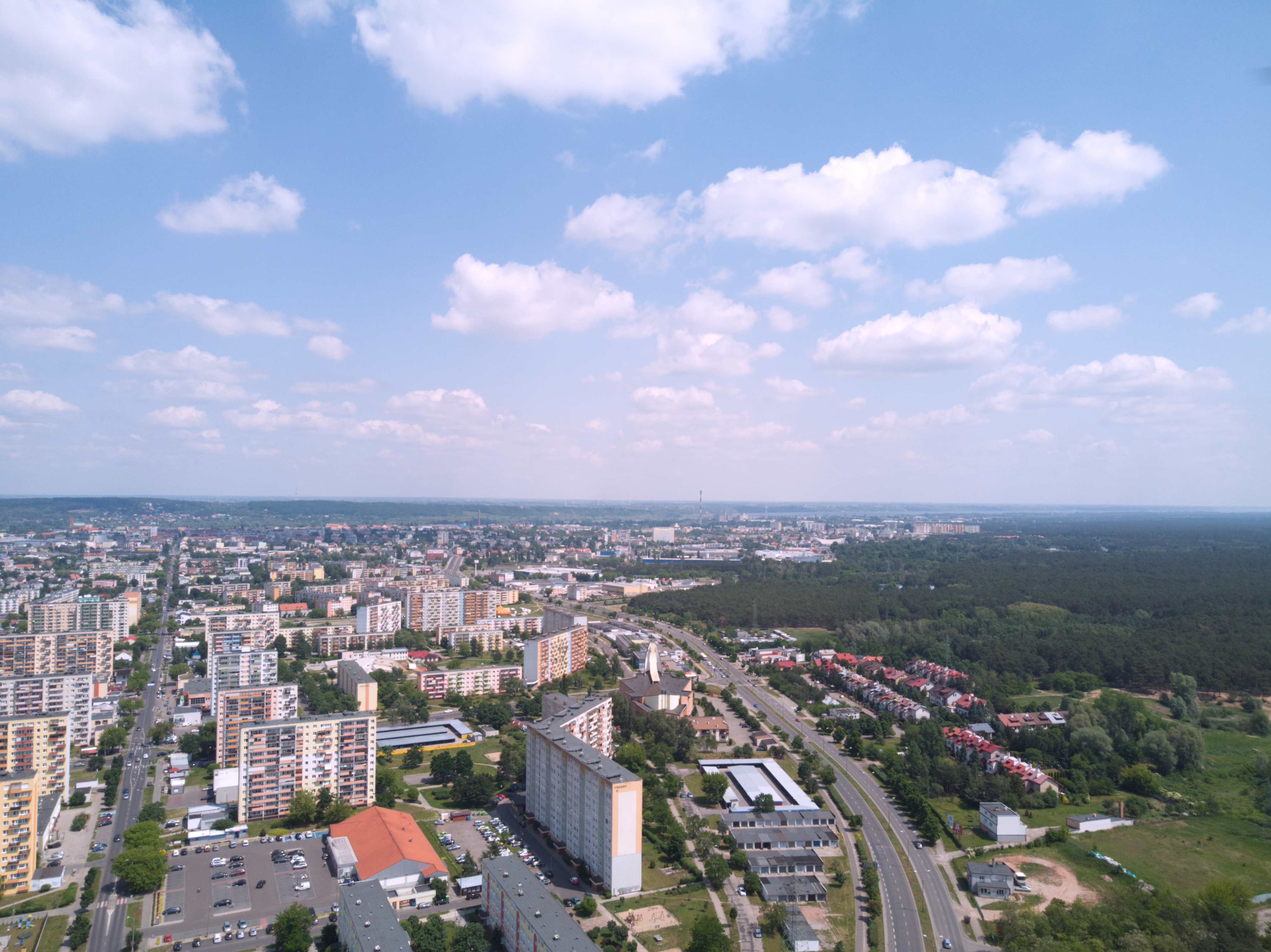 Dzielnica Południe z lotu ptaka (2020 r.)